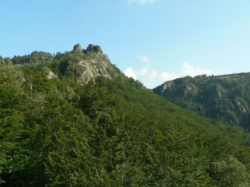 Frýdlantské cimbuří, Jizera Mountains